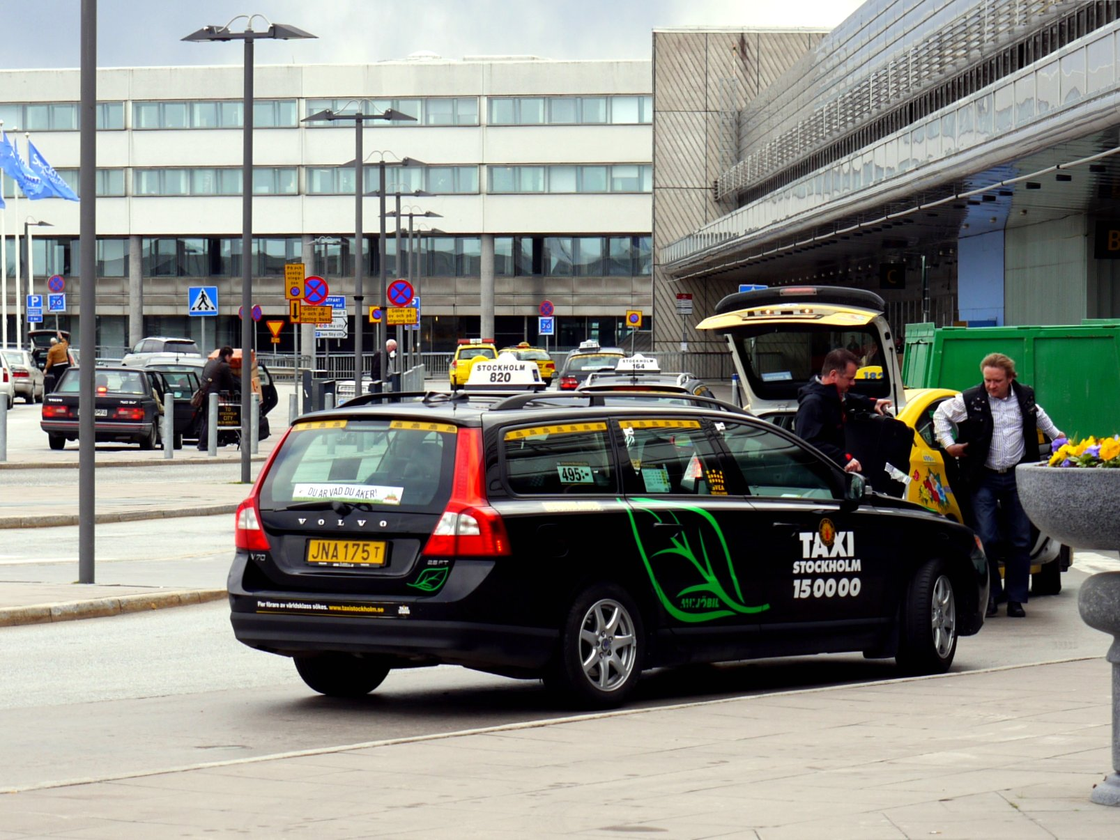 Taxi Stockholm Volvo V70 2.5 FT.